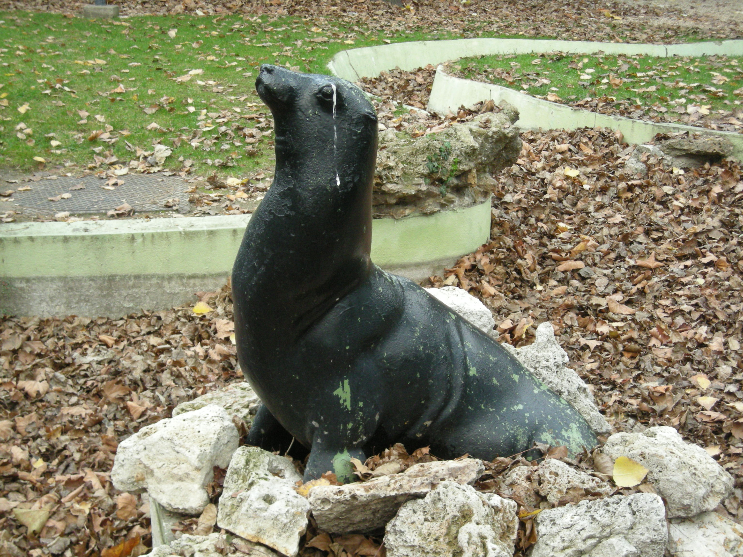 Otarie by Émile Perrault-Harry (1878 - 1938), jardins de l'hôpital Sainte-Anne, Paris.